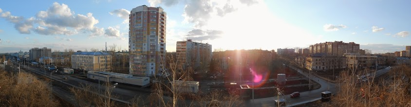 ул. Копылова 18